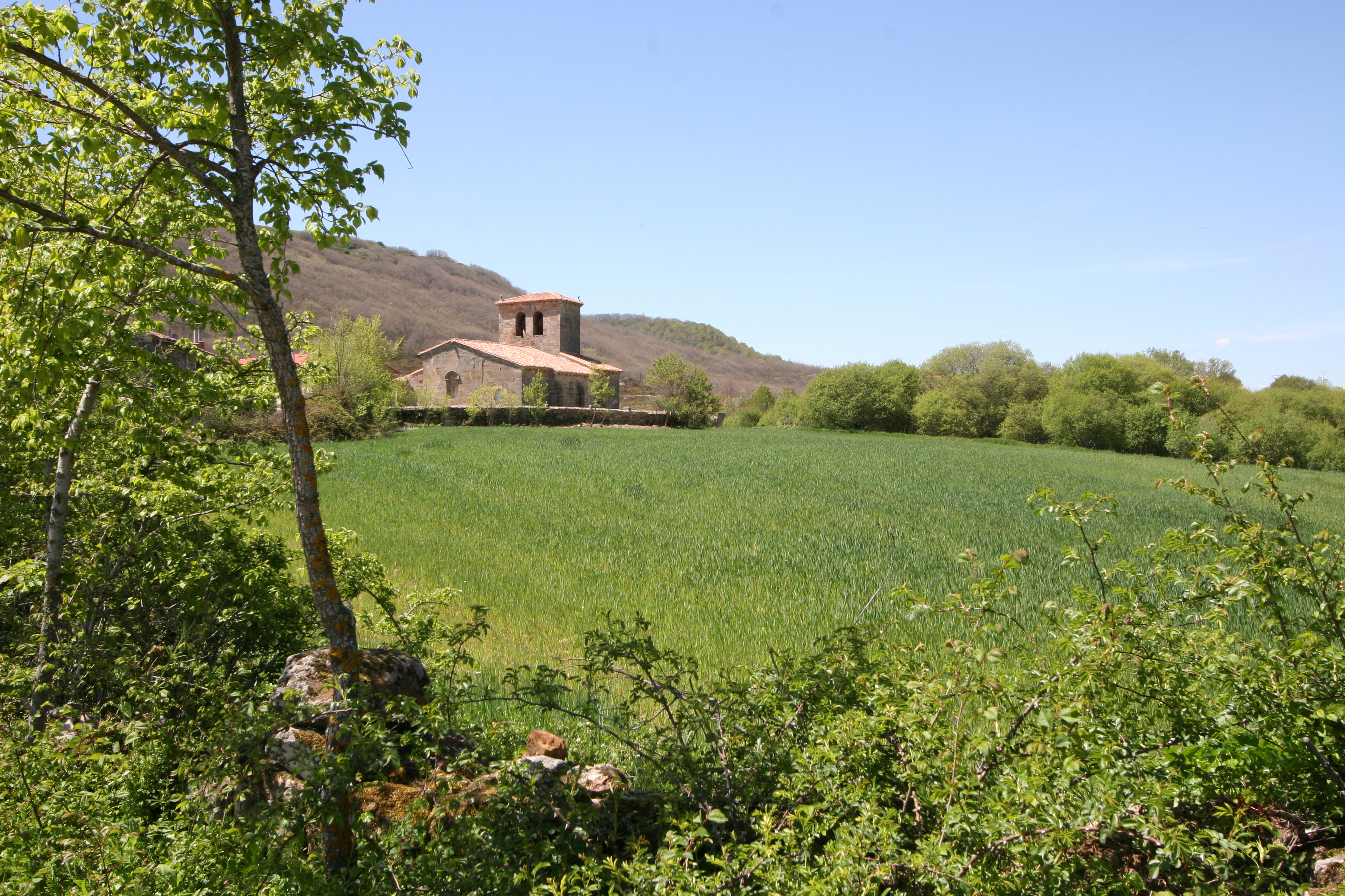 Entorno de la iglesia de Santiago (Cezura, Palencia).